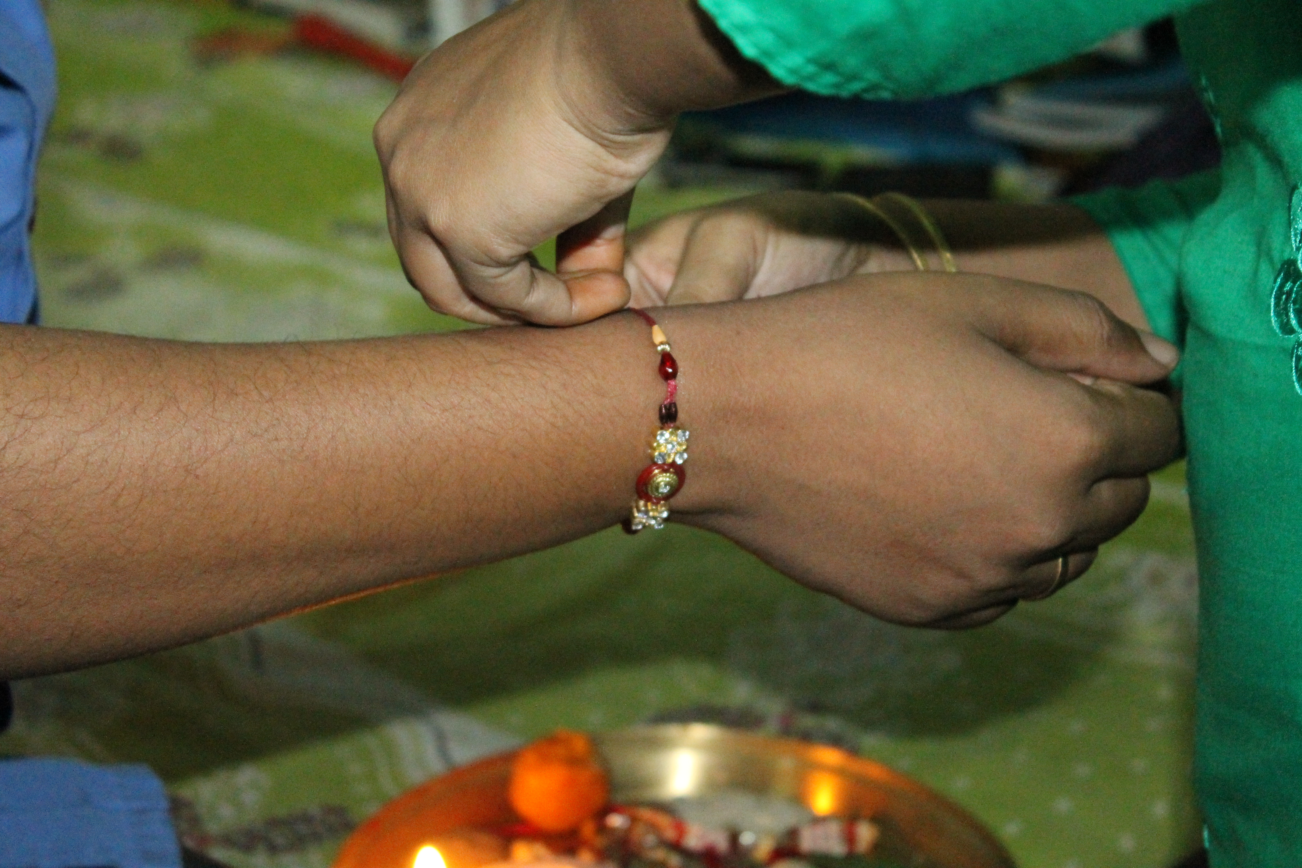 ଓଡ଼ିଆ: Bhai Bhauni Ra pabitra Bandhana